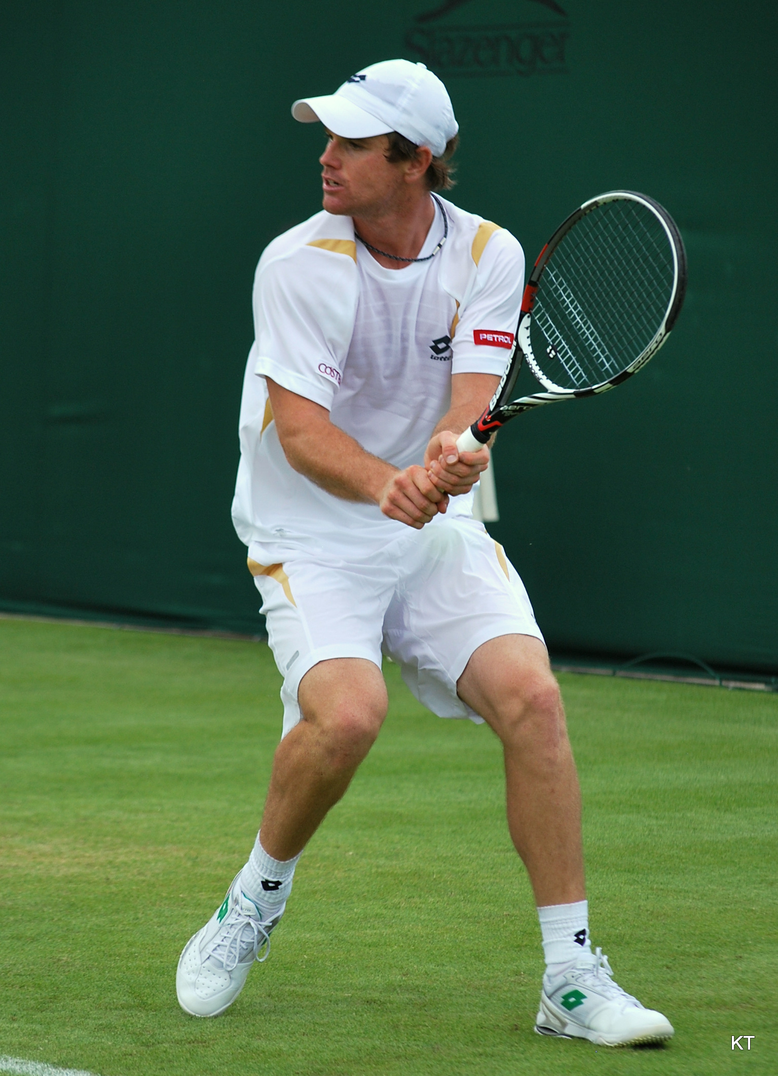 Blaz Kavcic